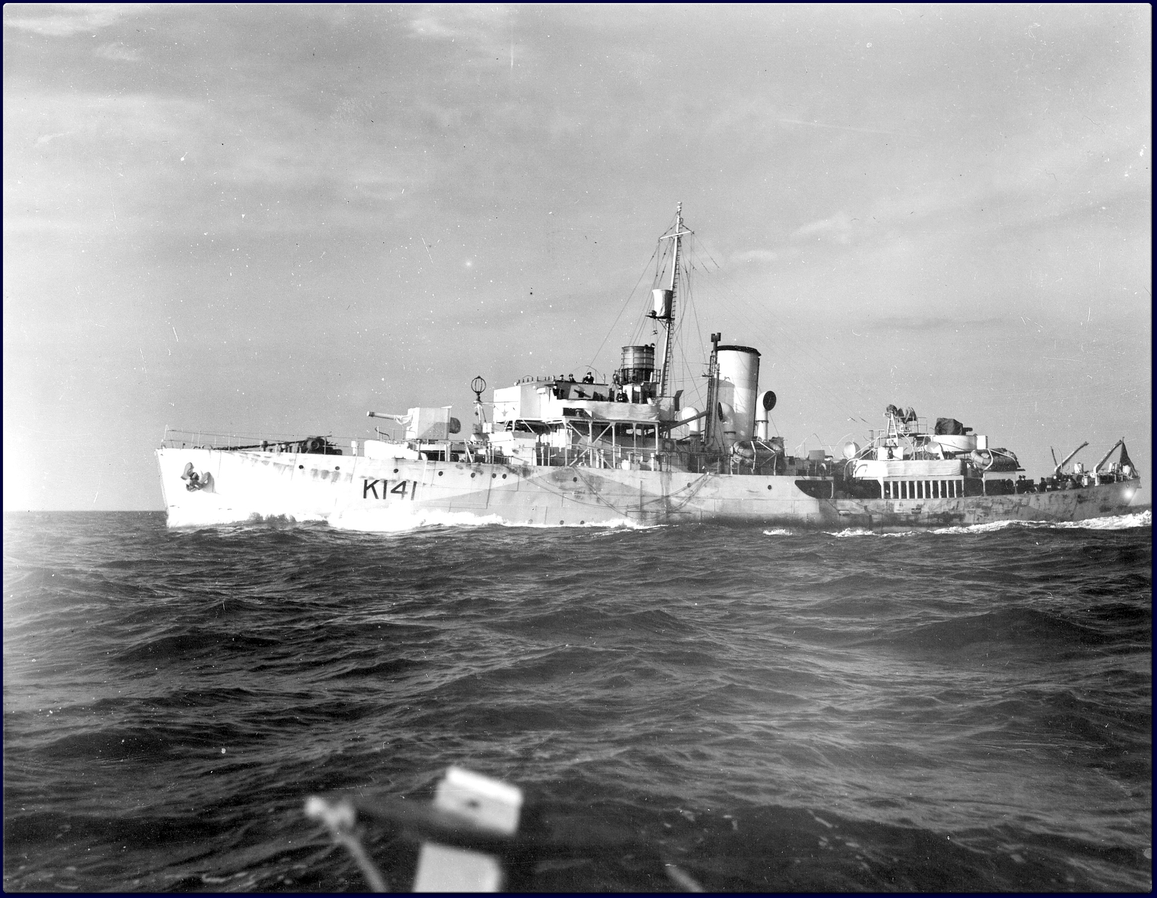 HMCS Summerside circa 1943-1945.